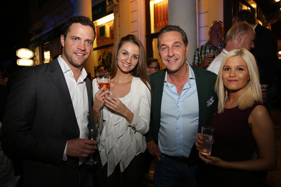 Gudenus_Johann,Heinz-Christian Strache-8890